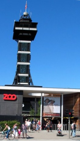 Zoologisk Have. København. Hovedindgang ©2005 Hans Jørn Storgaard Andersen